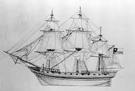 Corbeta Confederación bajo bandera chilena.